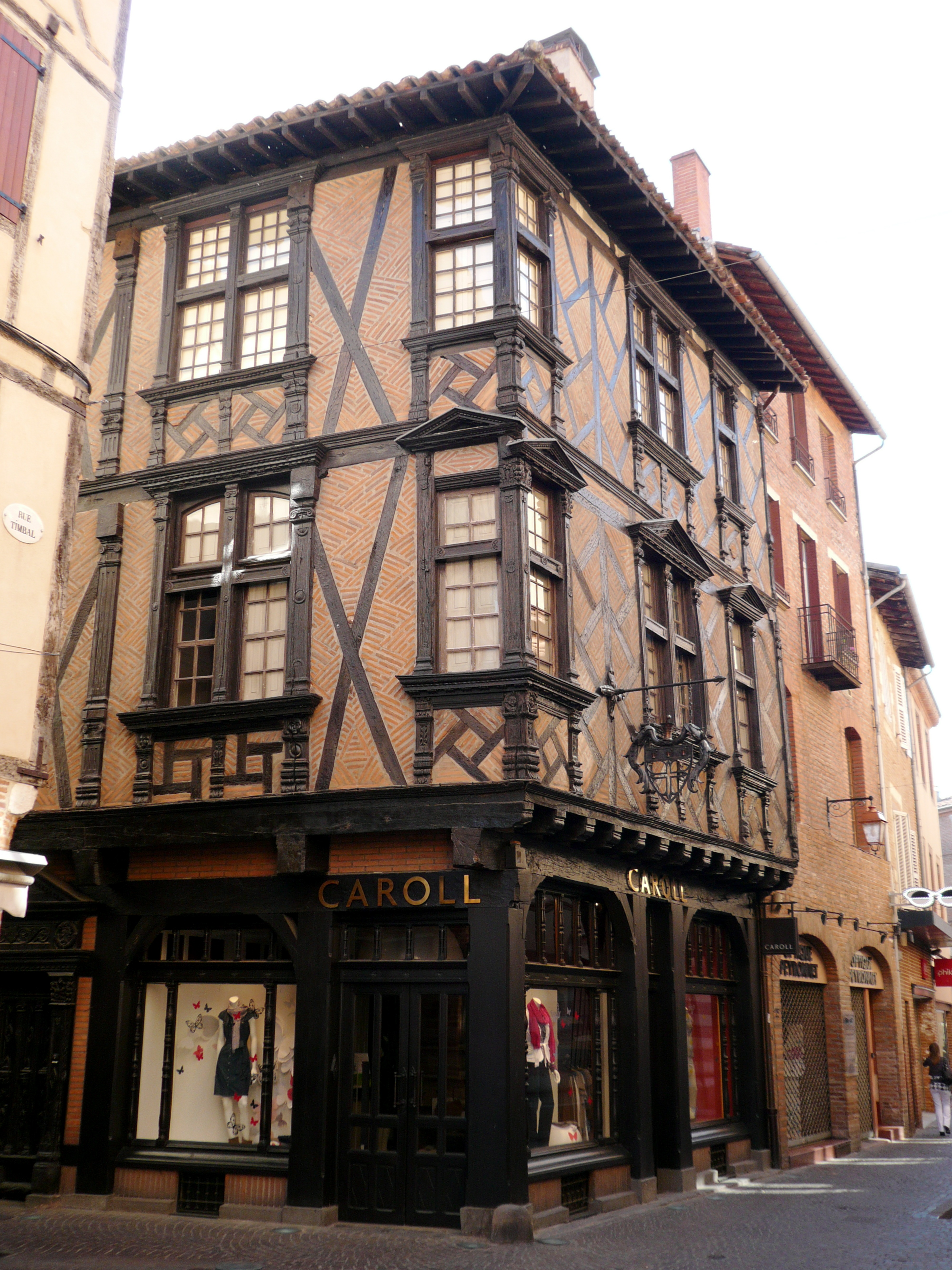 Maison Enjalber, Maison à colombages à Albi